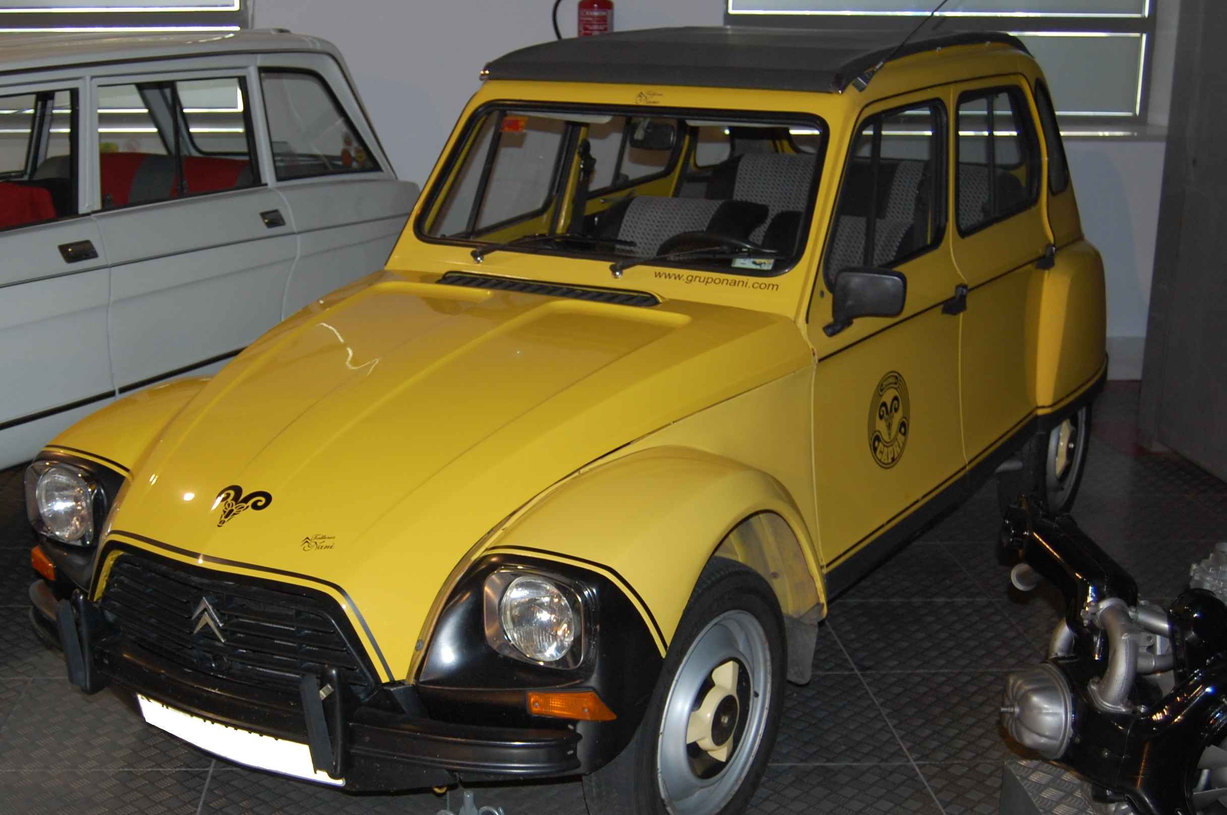 Dyane 6 edición limitada y numerada CAPRA